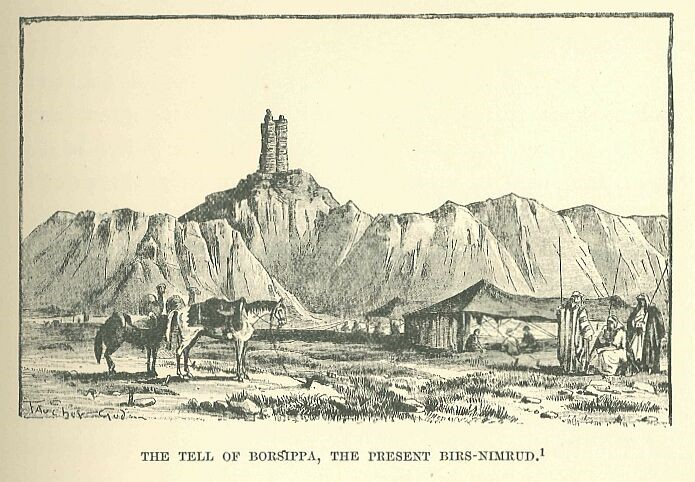 Der Berg von Borsippa (im Altertum auch Babel). Heute Birs-Nimrud. Gezeichnet von Faucher-Gudin.